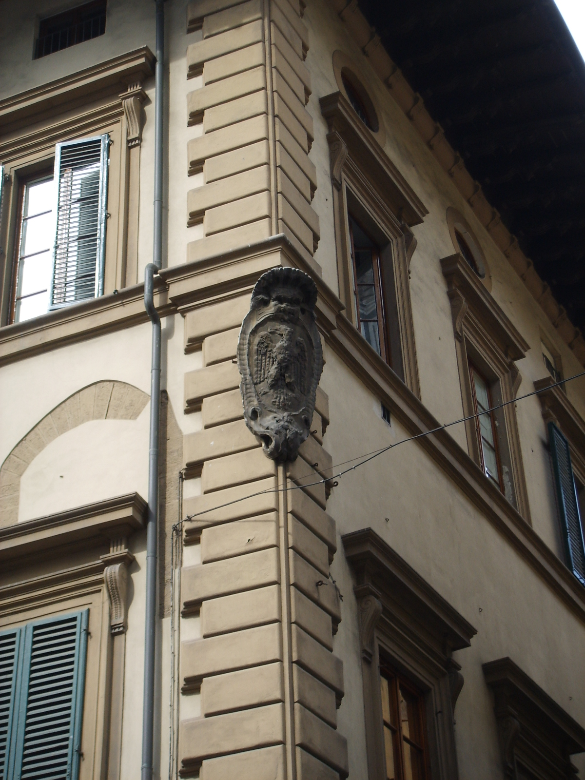 Palazzetto_Del_Bianco in Florence